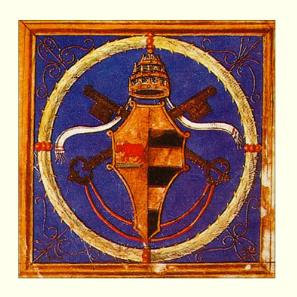 Escudo pontificio de Alejandro VI. Misal de Navidad. Siglo XV. Biblioteca Apostólica Vaticana.